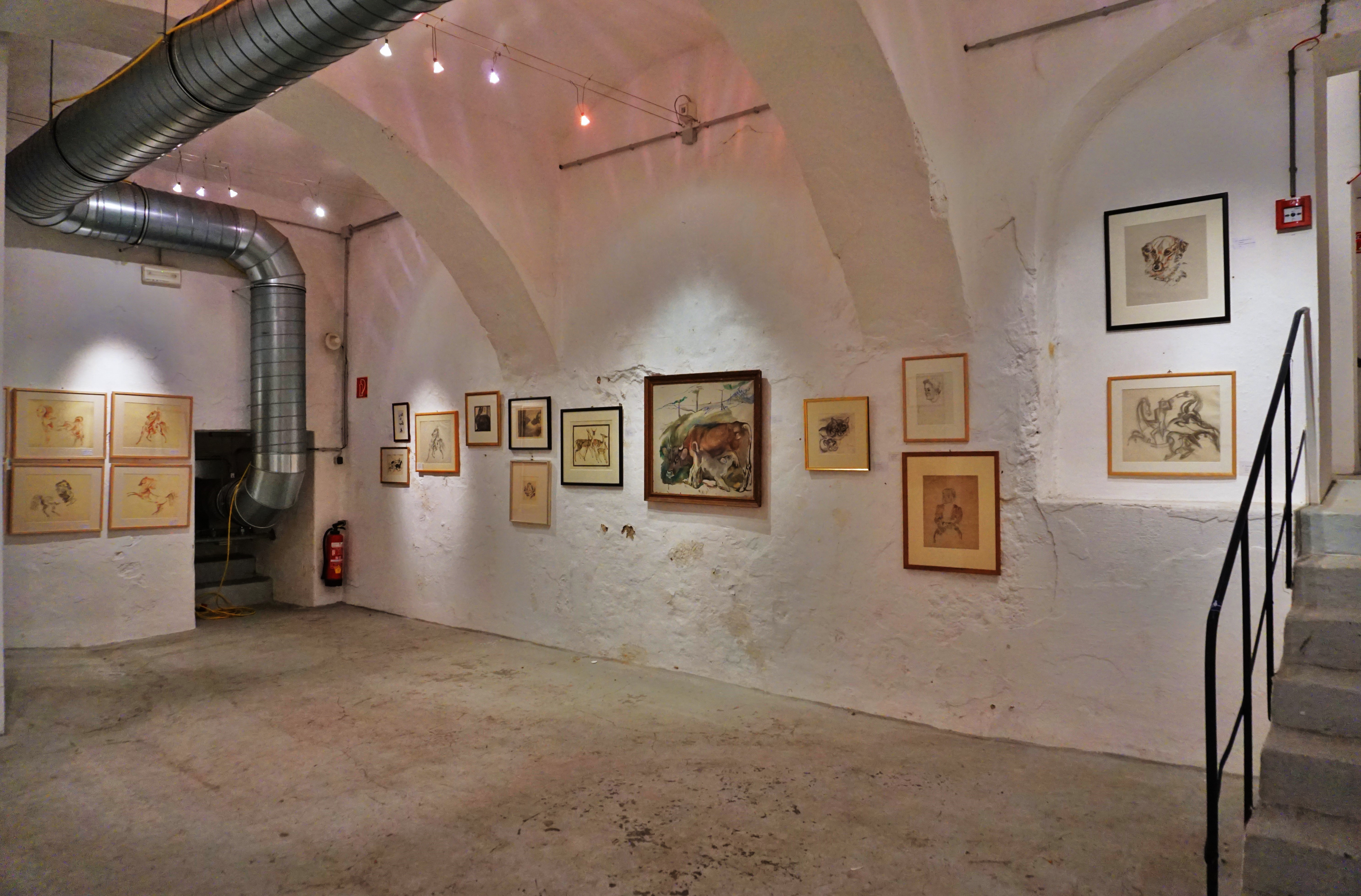 KunsthausSudhaus Villach: Ausstellung Luswig Heinrich Jungnickel 2016/2o17